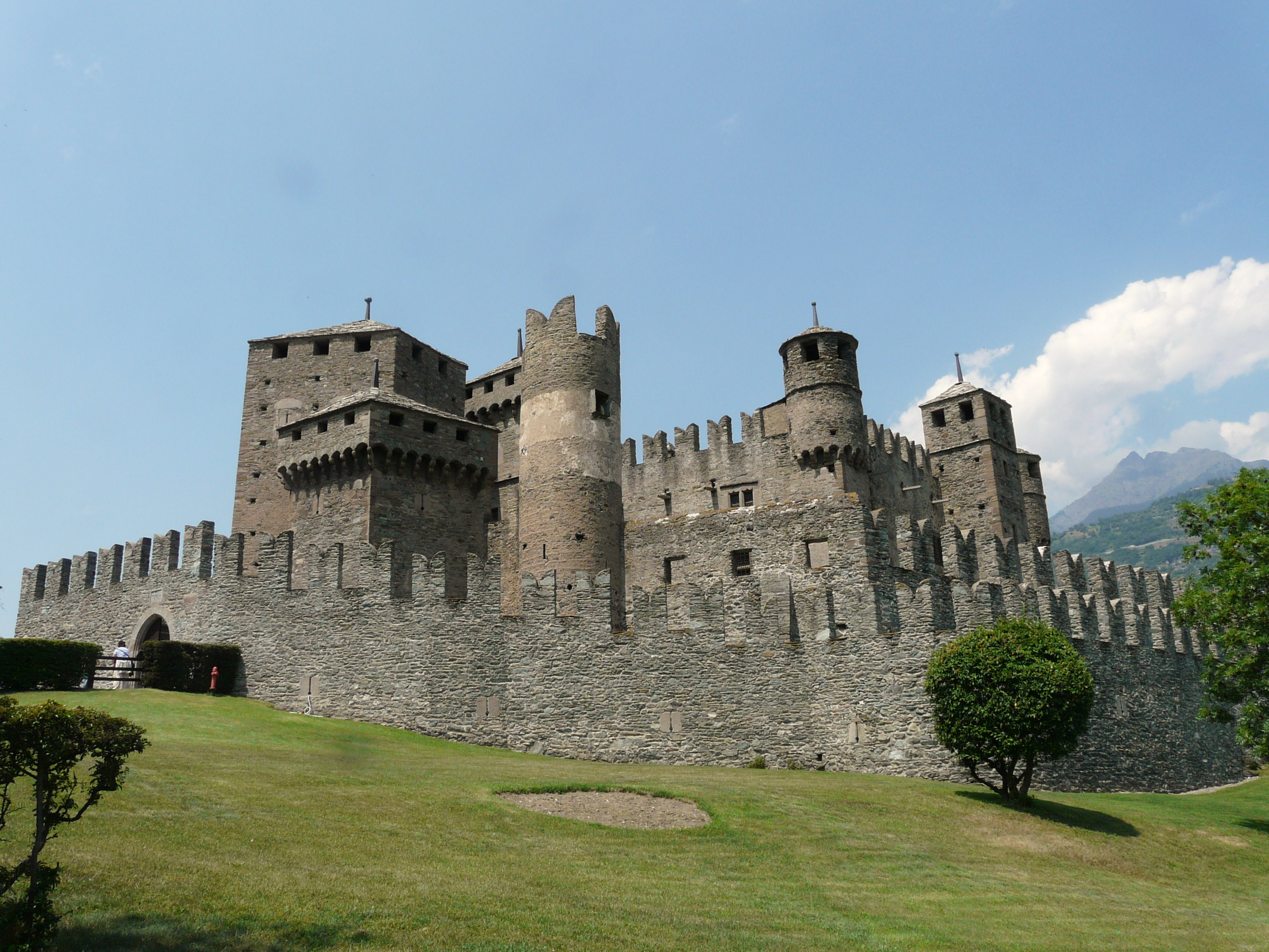 Serie di immagini del Castello di Fénis, Valle d'Aosta, Italia